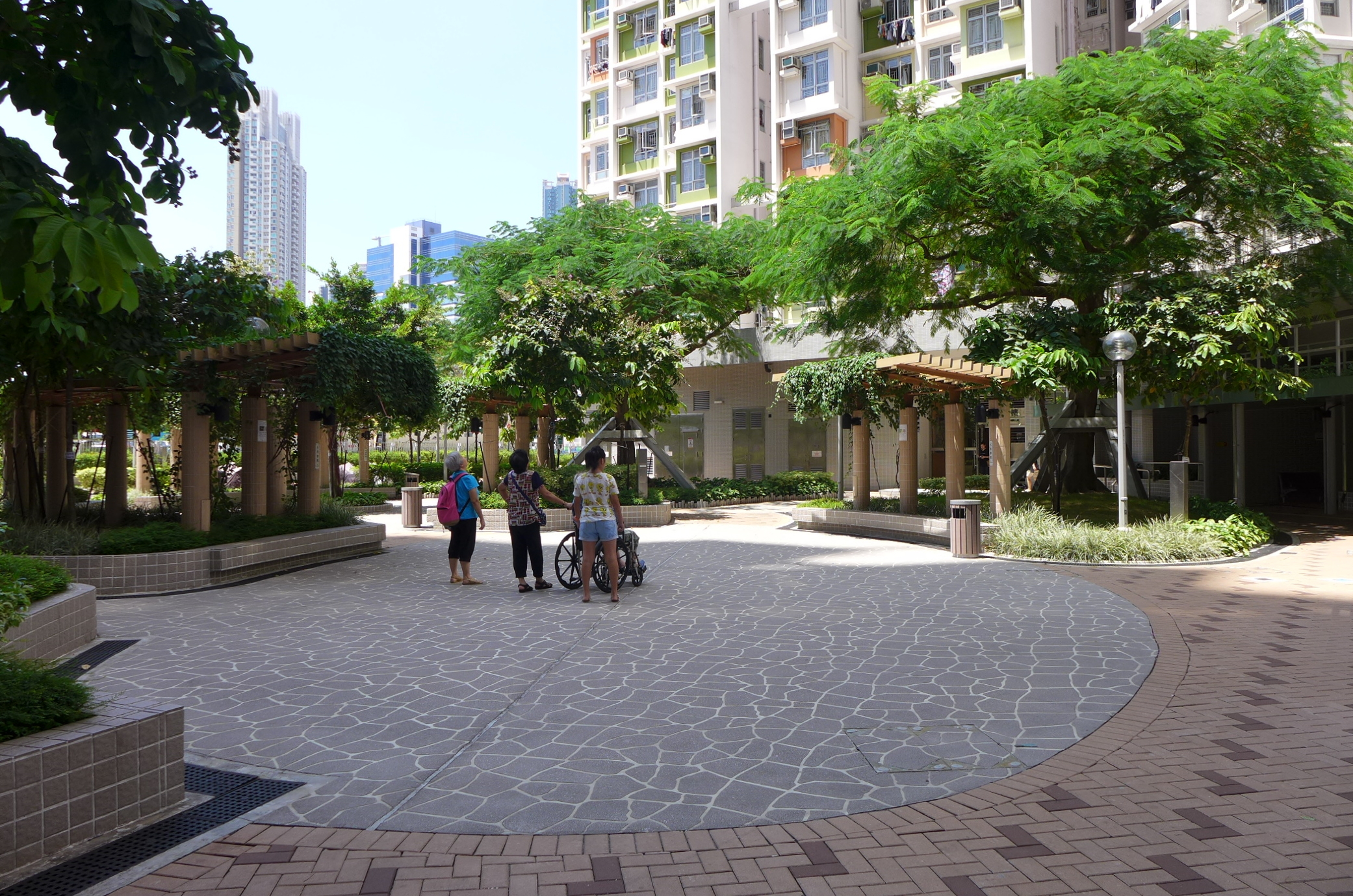 Cheung Sha Wan Estate Garden